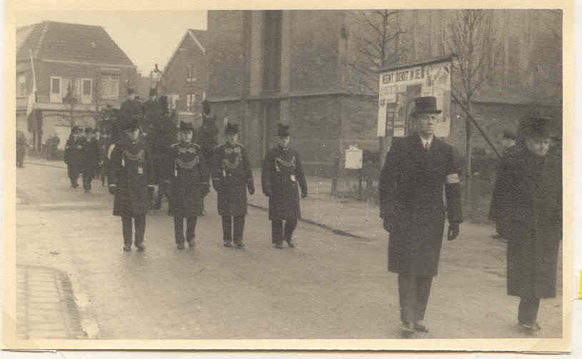 Bijzetting van de lichamen van omgekomen verzetsstrijders in het Mausoleum in Ede. Van Spankeren loopt links. Recht loopt hoofd van de Nederlands Hervormde School aan de Bergstraat. Van Spankeren gaf in de oorlog lid aan verzetsgroep-De Vries.